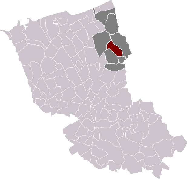 Locatie gemeente Killem in arrondissement Duinkerke. Zelfgemaakt. Location of Killem municipality in the arrondissement of Dunkirk. Self made. Localisation de la commune de Killem dans l'arrondissement de Dunkerque. Fait moi-même.